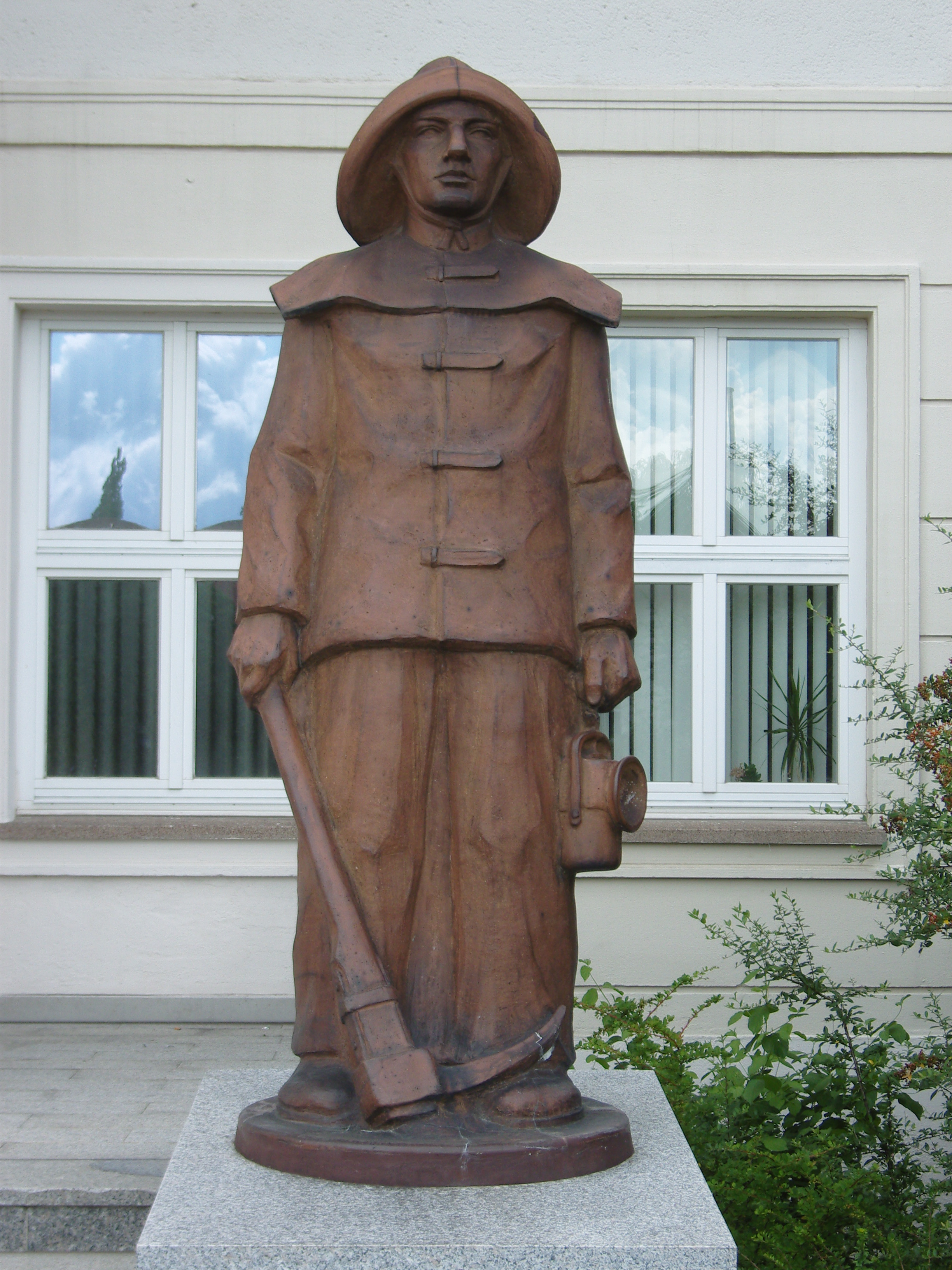 Figur eines Bergmanns vor der Fachhochschule Lausitz (FHL) in Senftenberg von Dorothea von Philipsborn